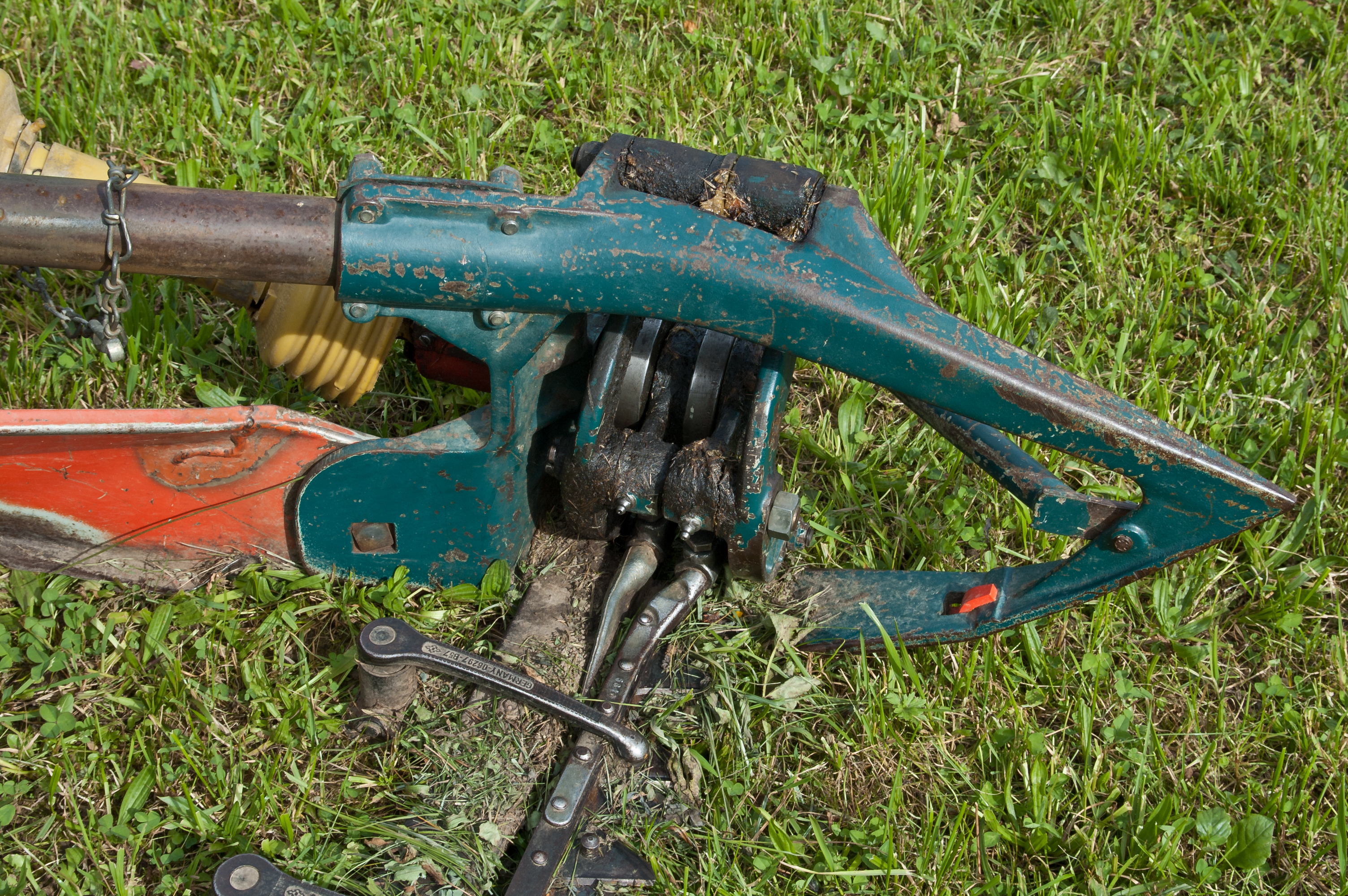 Motormäher auf einer Wiese im Berchtesgadener Land mit Busatis-Doppelmessermähbalken